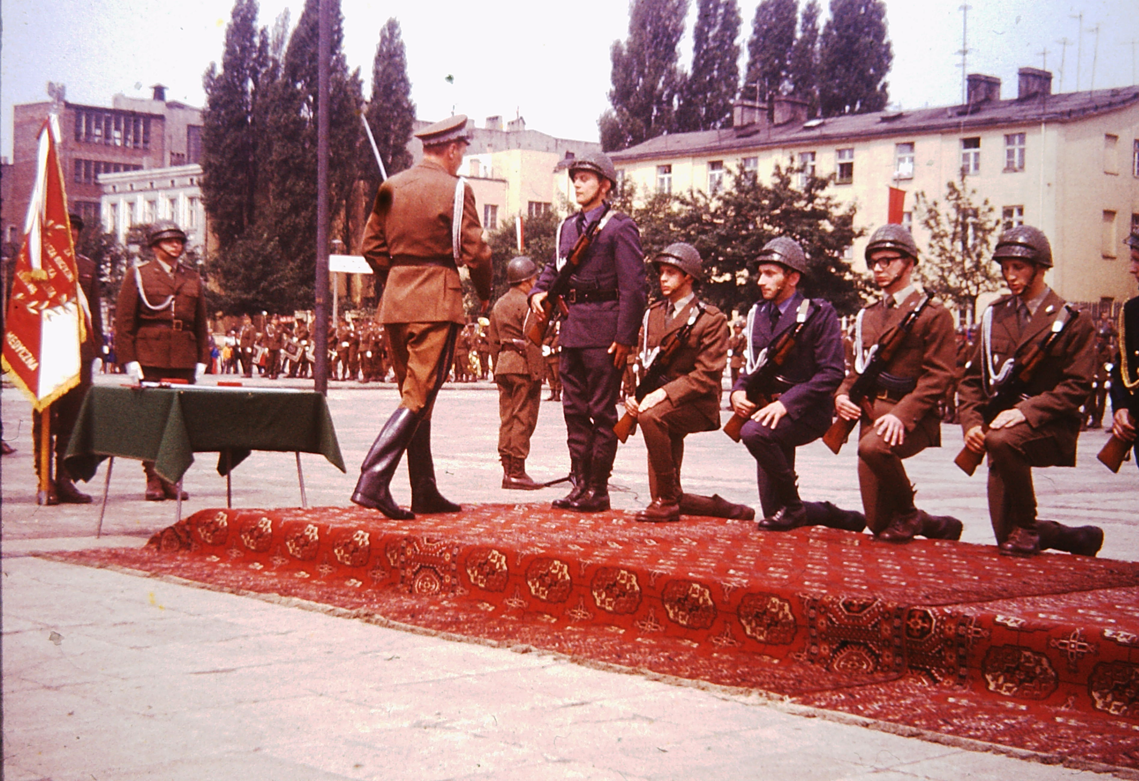 Promocja oficerska WAM 1974. W okularach - drugi od prawej - klęczy Krzysztof Zieliński, a czwarty od prawej - Marek Krzysztof Janiak.